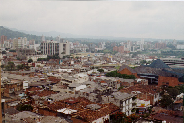 Pereira - Risaralda - Colombia - Vista general de la ciudad Autor: Alfredo Bianco Geymet 1998